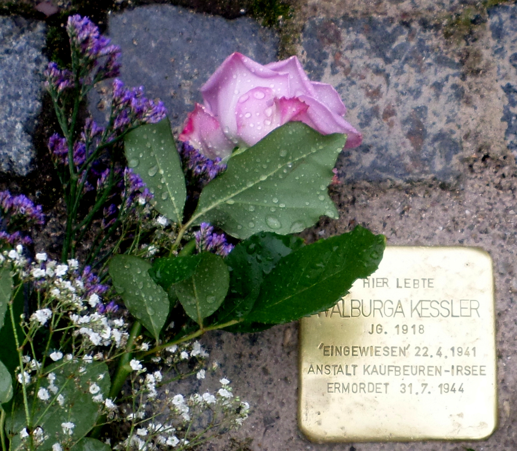 Stolperstein Walburga Kessler in Irsee - Recherche und Bild von Matt Kessler, Urgroßneffe